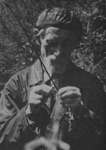 Lazar Drljaca en pêche